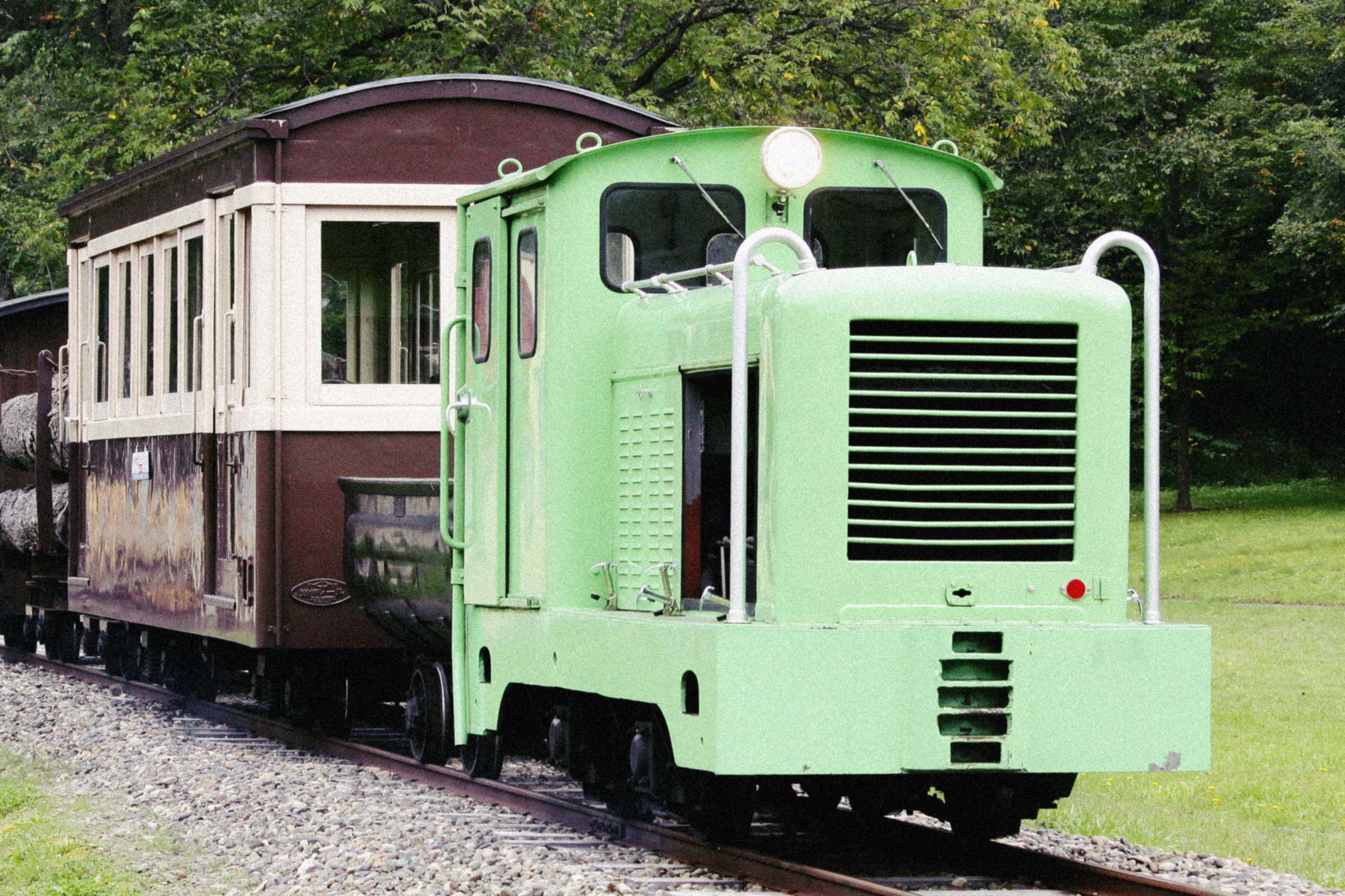 鶴居村営軌道6tディーゼル機関車。北海道遠軽町「丸瀬布森林公園いこいの森」にて2014年撮影。